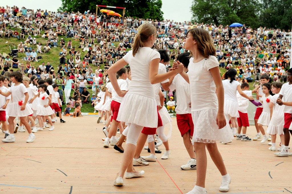 Quelle: Regina Kühne